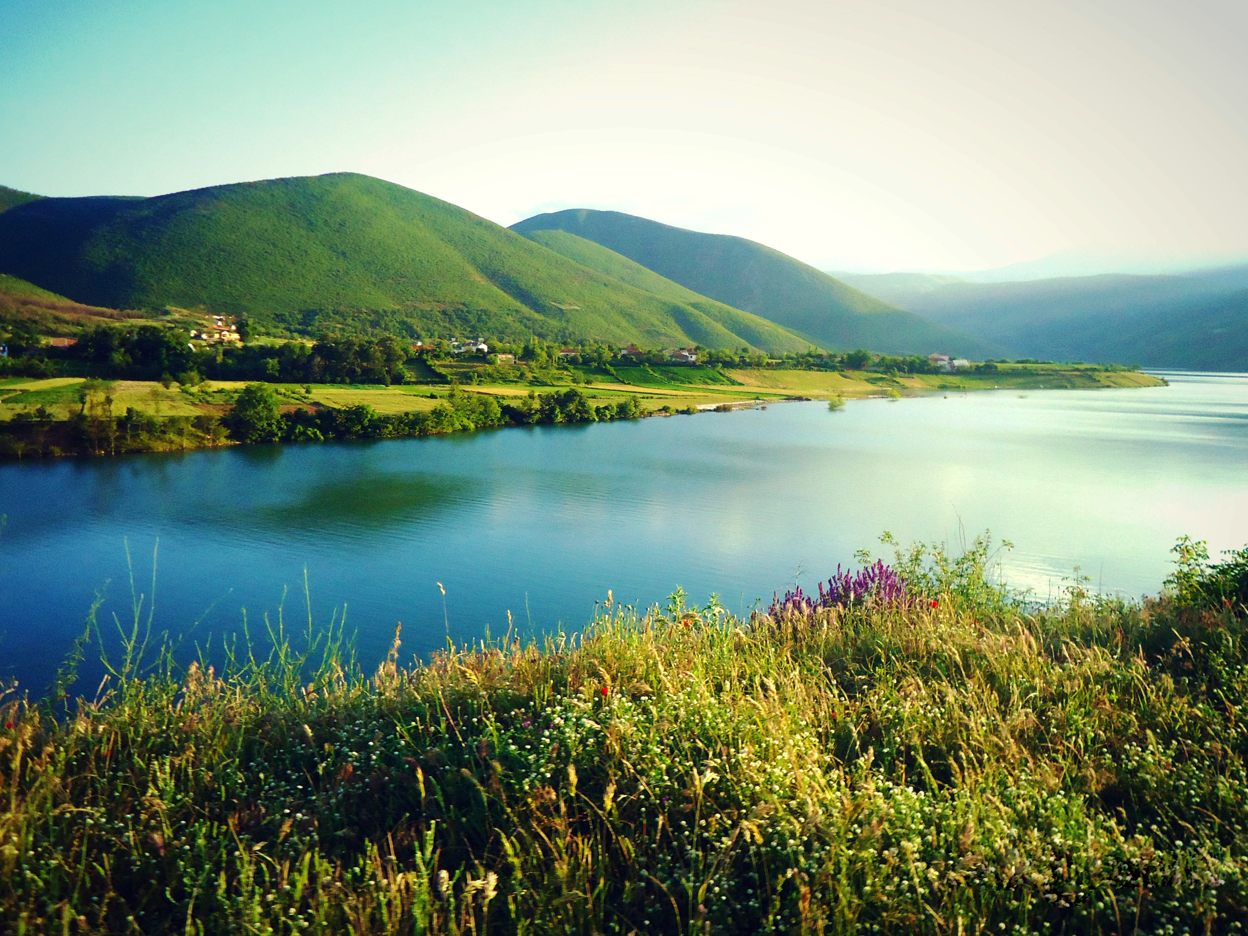 Nje pamje e mrekullueshme e Liqenit te Fierzes dhe fshatit Bushat, marre nga fushat e Nangeve